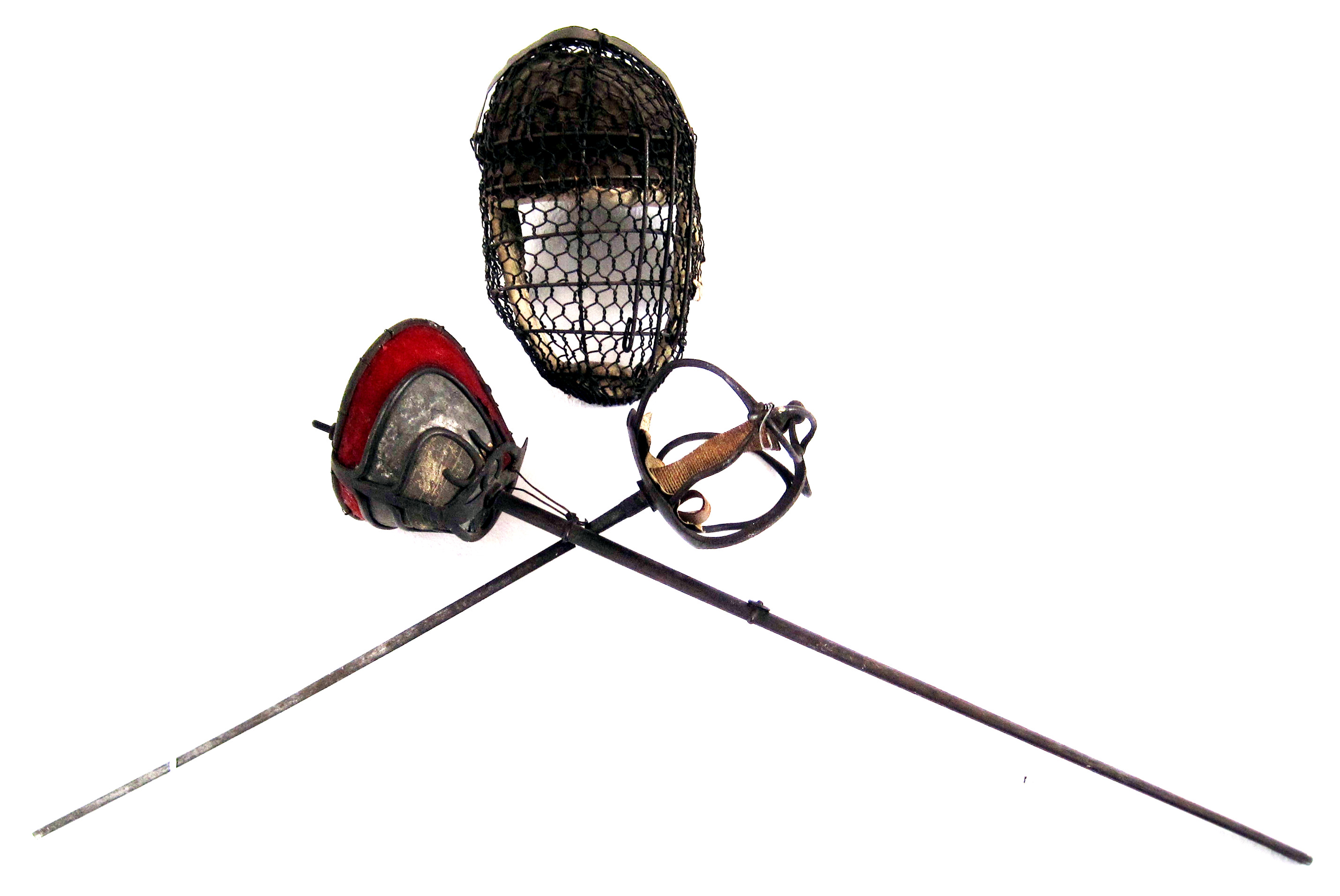 Mensurschläger (mit Paukschläger und Paukhelm) in den Farben des Corps Hannovera Göttingen im Bismarck-Museum in Friedrichsruh